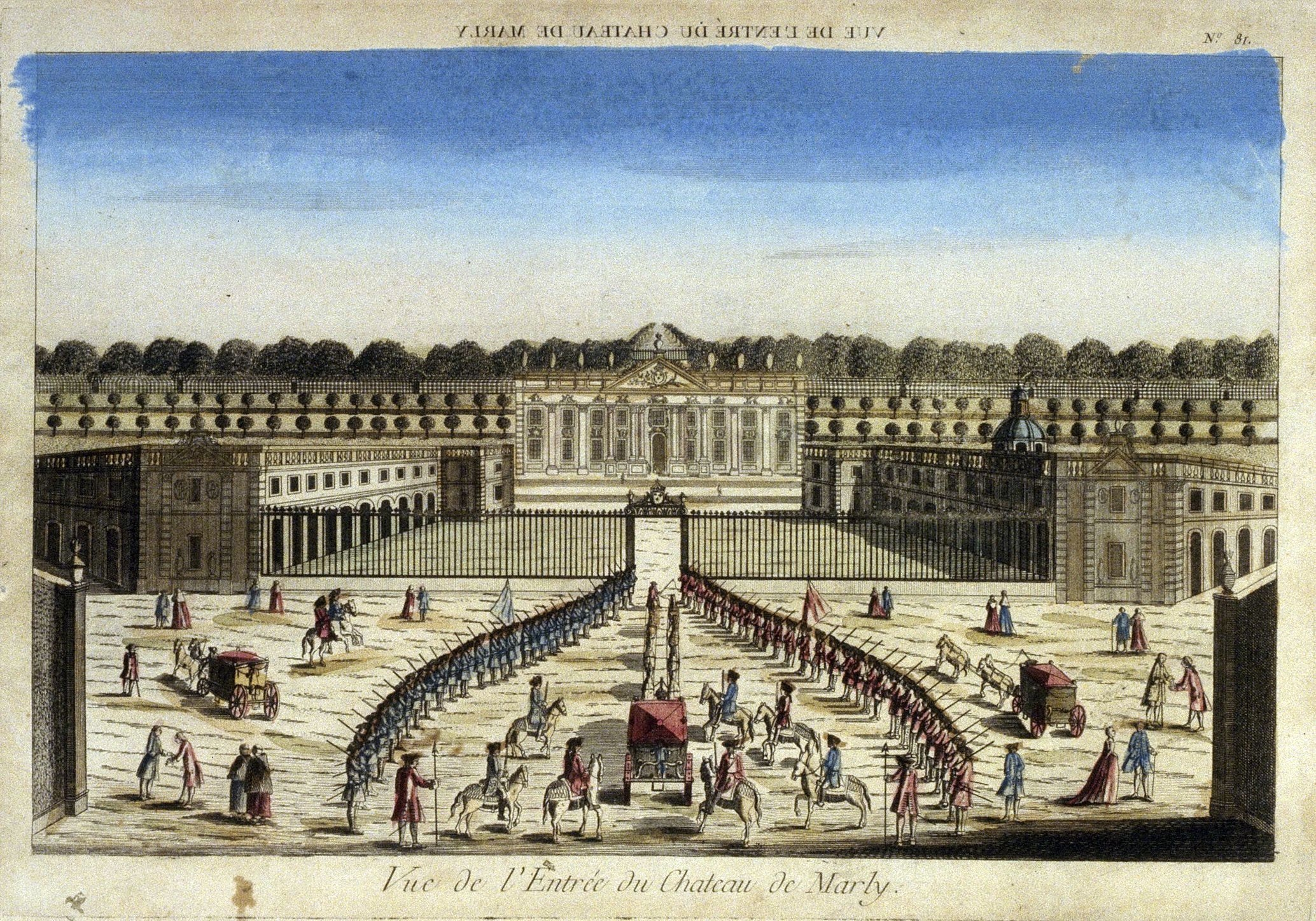 Eingangsbereich des Schlosses Marly-le-Roi